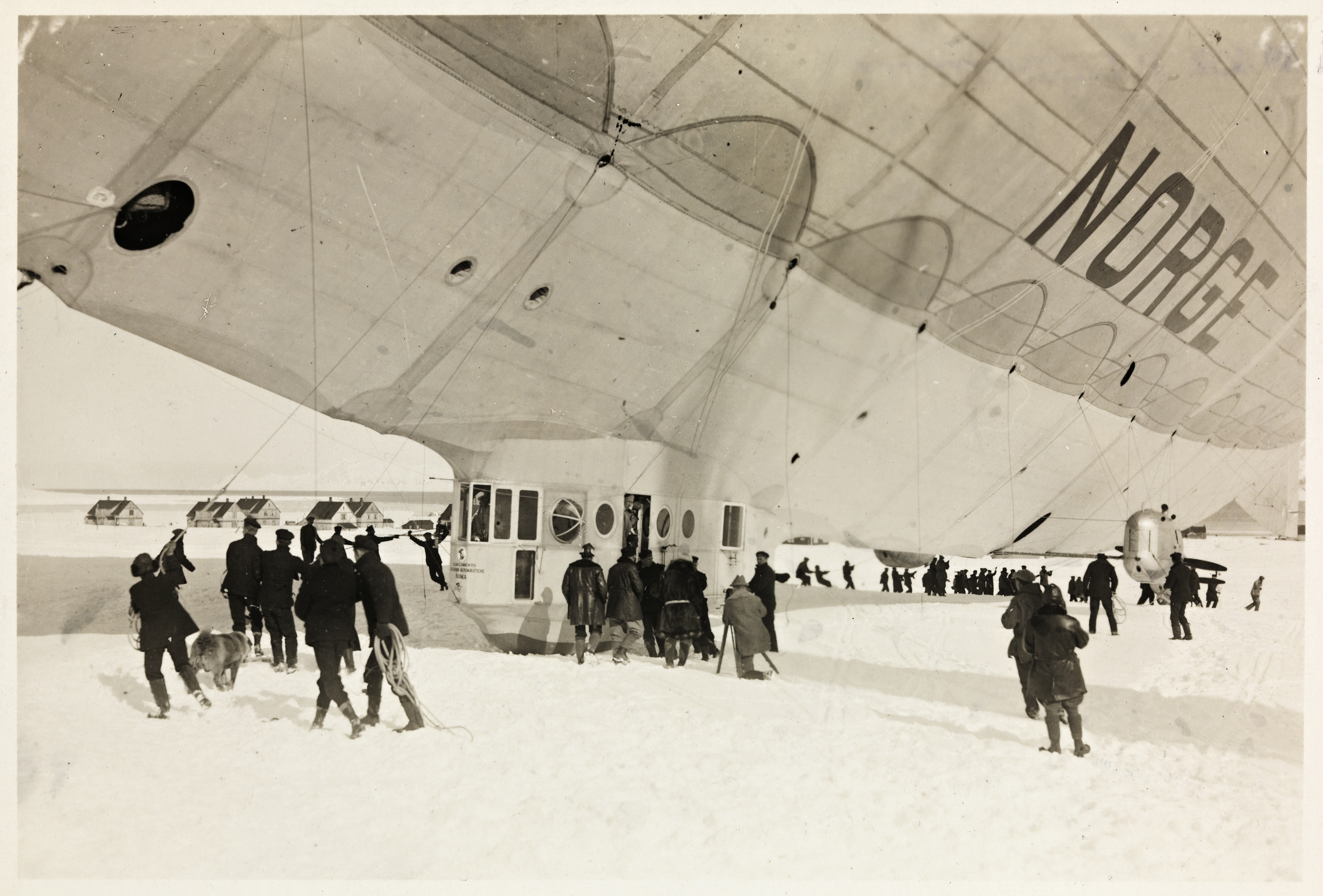 Tittel / Title: Luftskipet "Norge" like før avreise fra Ny-Ålesund Beskrivelse / Description: Gelatin papirpositiv. Luftskipet holdes ved bakken av alle menneskene. Roald Amundsen står i gondolens dør, og på bakken foran ham står fotograf Paul Berge på kne med kameraet sitt. Dato / Date: 11. mai 1926 Fotograf / Photographer: ukjent / unknown Sted / Place: Svalbard, Ny-Ålesund Eier / Owner Institution: Nasjonalbiblioteket / National Library of Norway Lenke / Link: Bildesignatur / Image Number: bldsa_NPRA0037